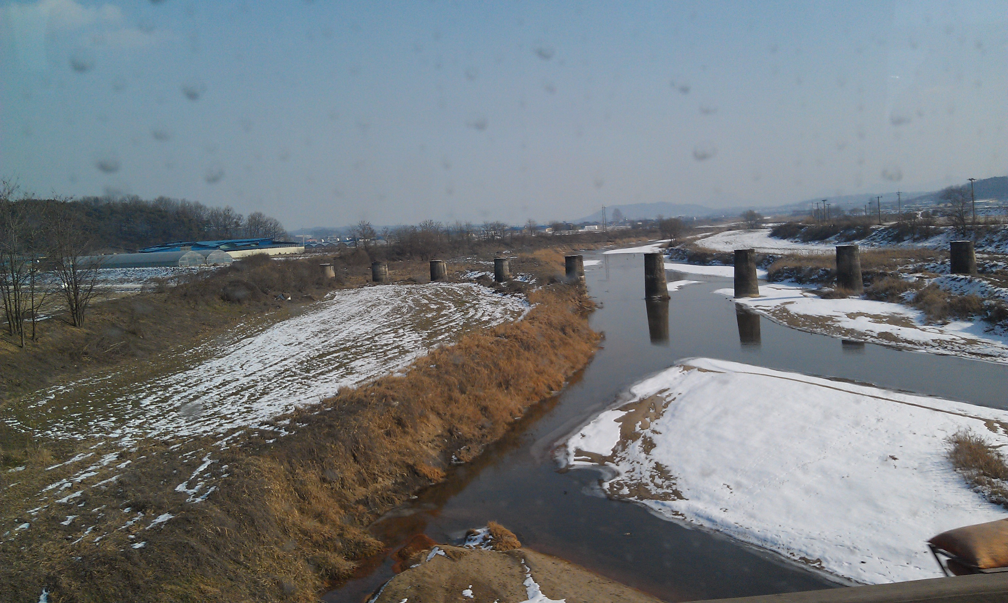 옛 경기선 청미천 철교 교각 (대한민국 경기도 안성시 일죽면 고은리 및 죽산면 매산리 소재.